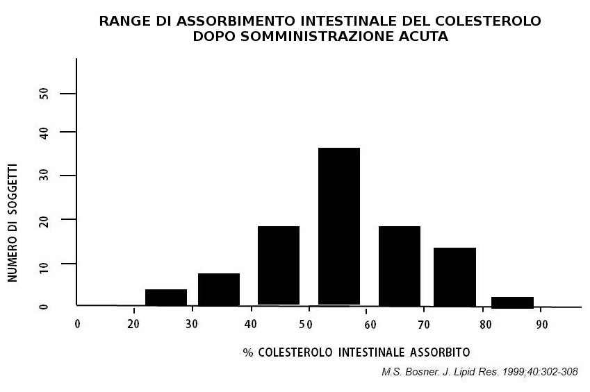 Range di assorbimento intestinale di colesterolo in 94 individui sani dopo somministrazione di 64 mg di colesterolo